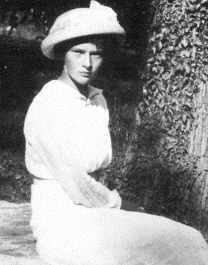 This photo of Grand Duchess Tatiana Nikolaevna of Russia in 1913 is from Because of its age, I think it's probably in the public domain